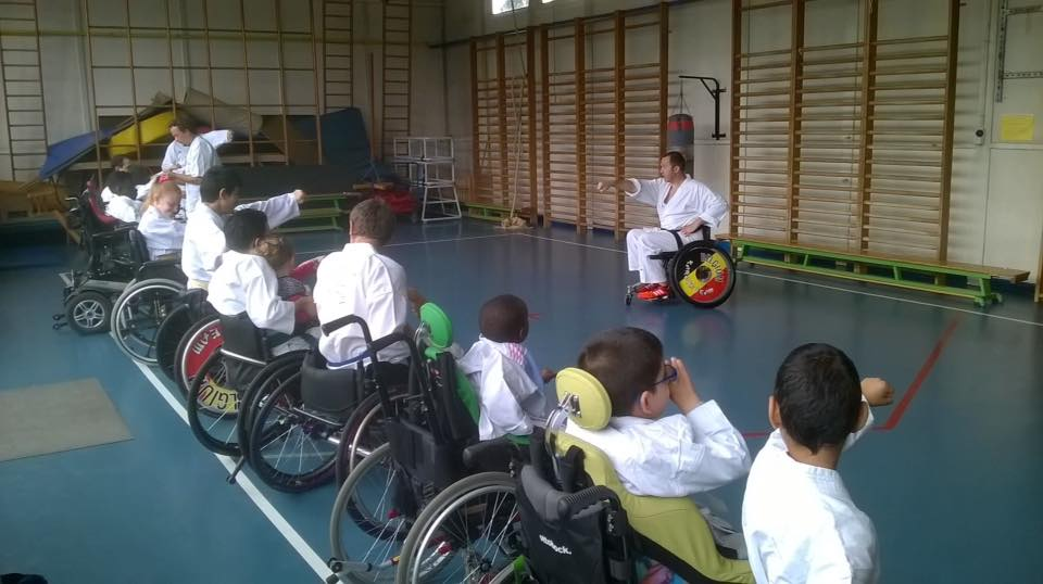 Avec un public d'enfants dits IMC